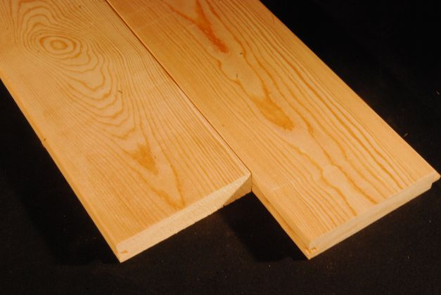 Половая доска из лиственницы